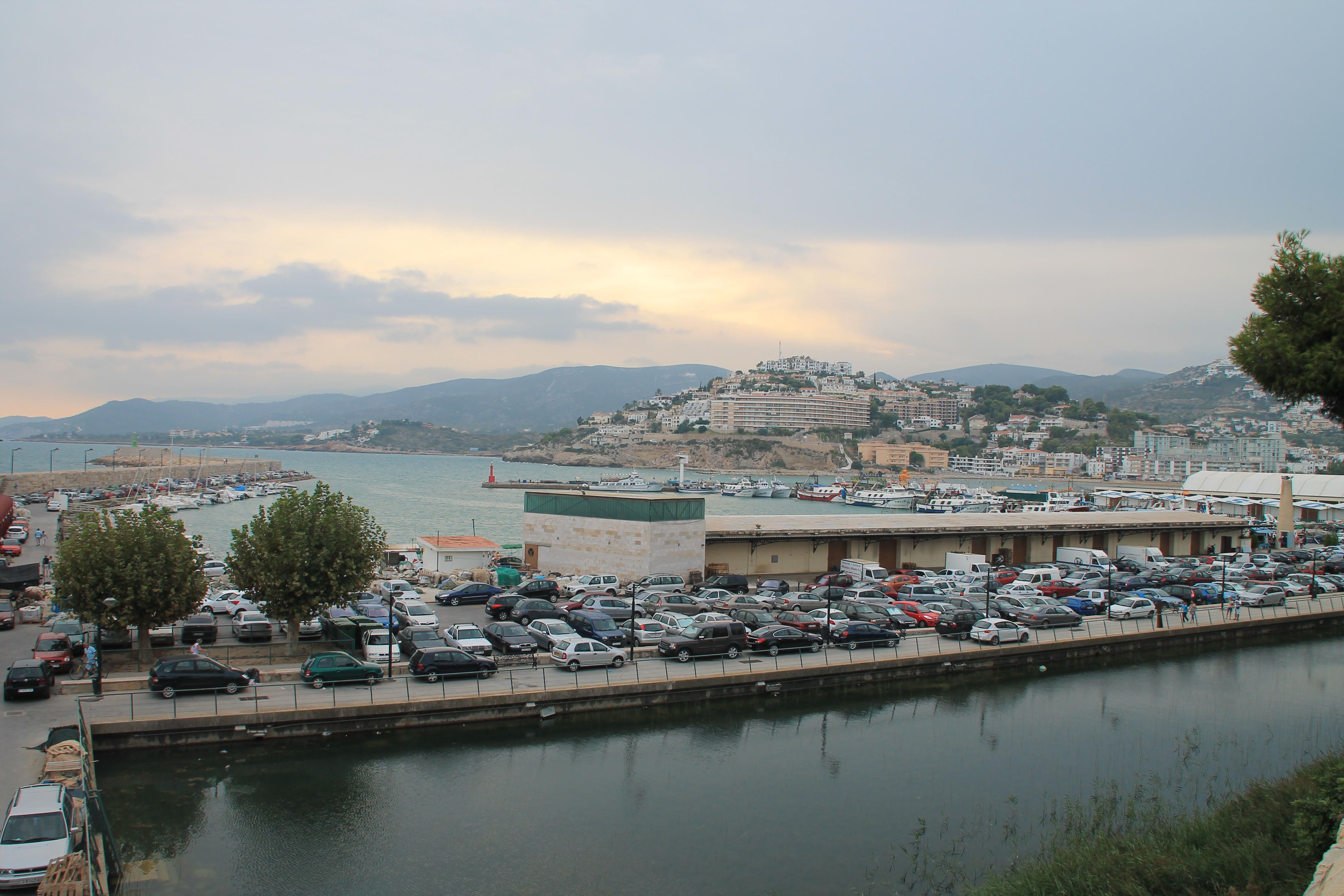 Peñiscola - puerto